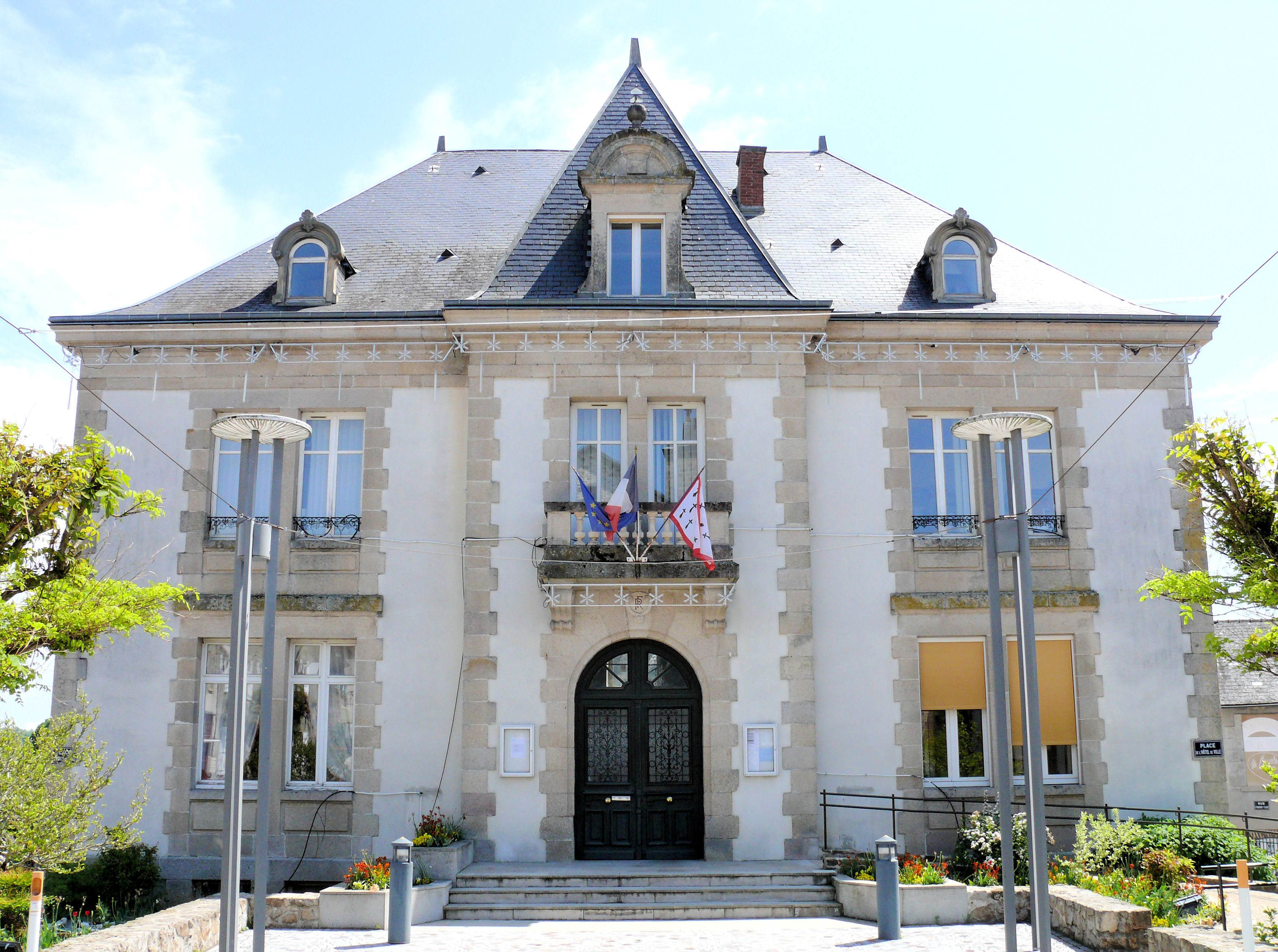 Mairie d'Ambazac